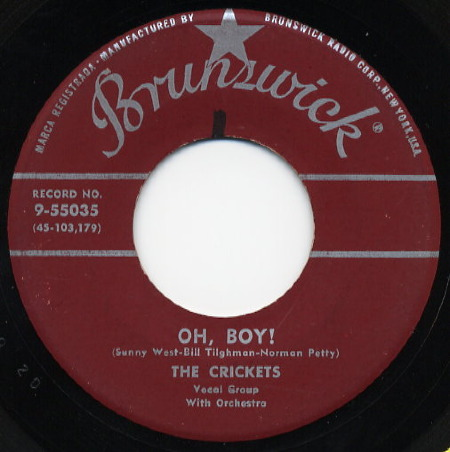 Es una foto de la etiqueta del sencillo de Buddy Holly "Oh Boy!".